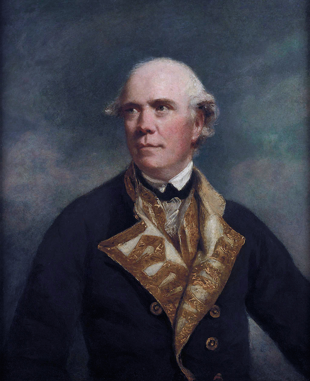 Samuel Barrington (1729-1800)